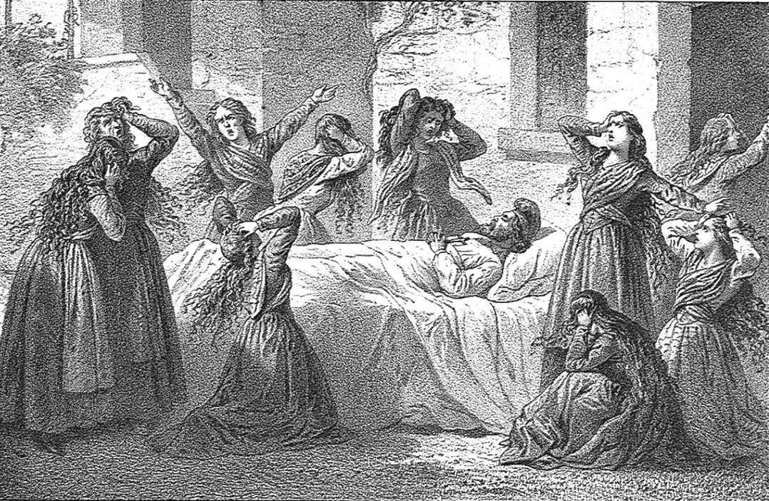 Voceru